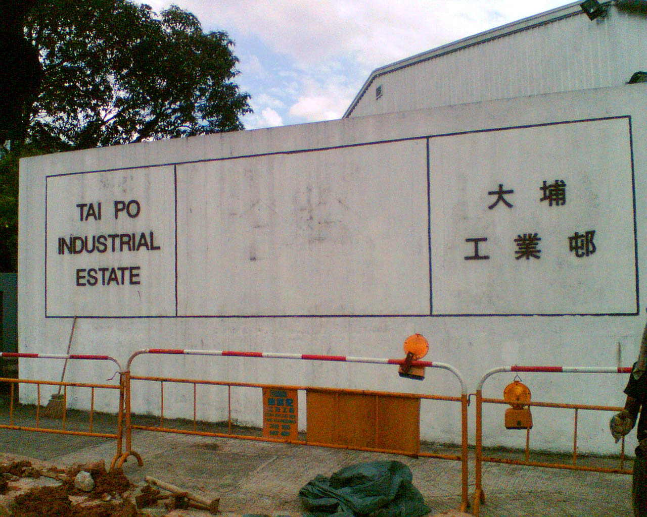 大埔工業園